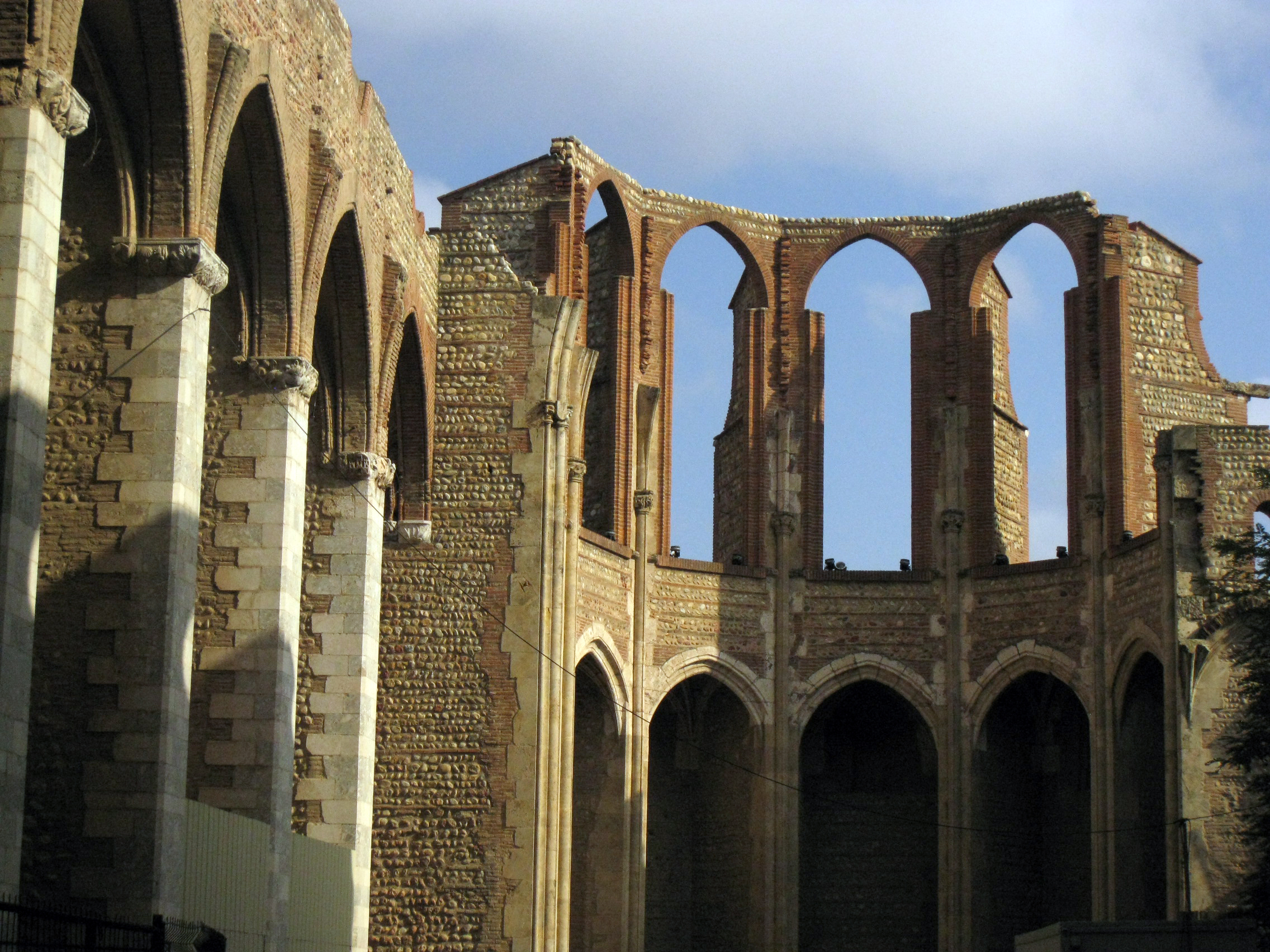 Església del Carme (Perpinyà), ruïnes de l'absis .